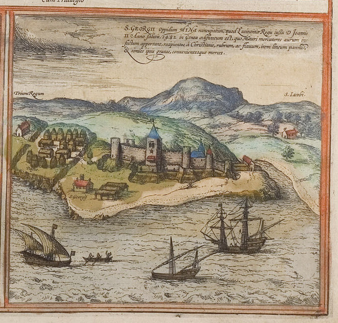 Elmina